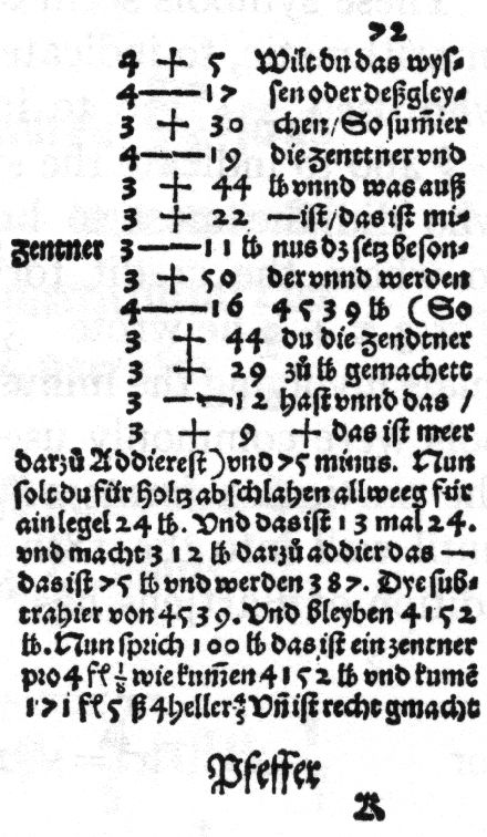 fragment Mercantile Arithmetic or Behende und hüpsche Rechenung auff allen Kauffmanschafft, autorstwa Johannes Widmann'a wydany w 1489 roku